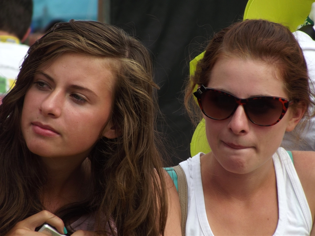 Zdjęcie zrobione podczas IV etapu 70. jubileuszowego Tour de Pologne w Katowicach.